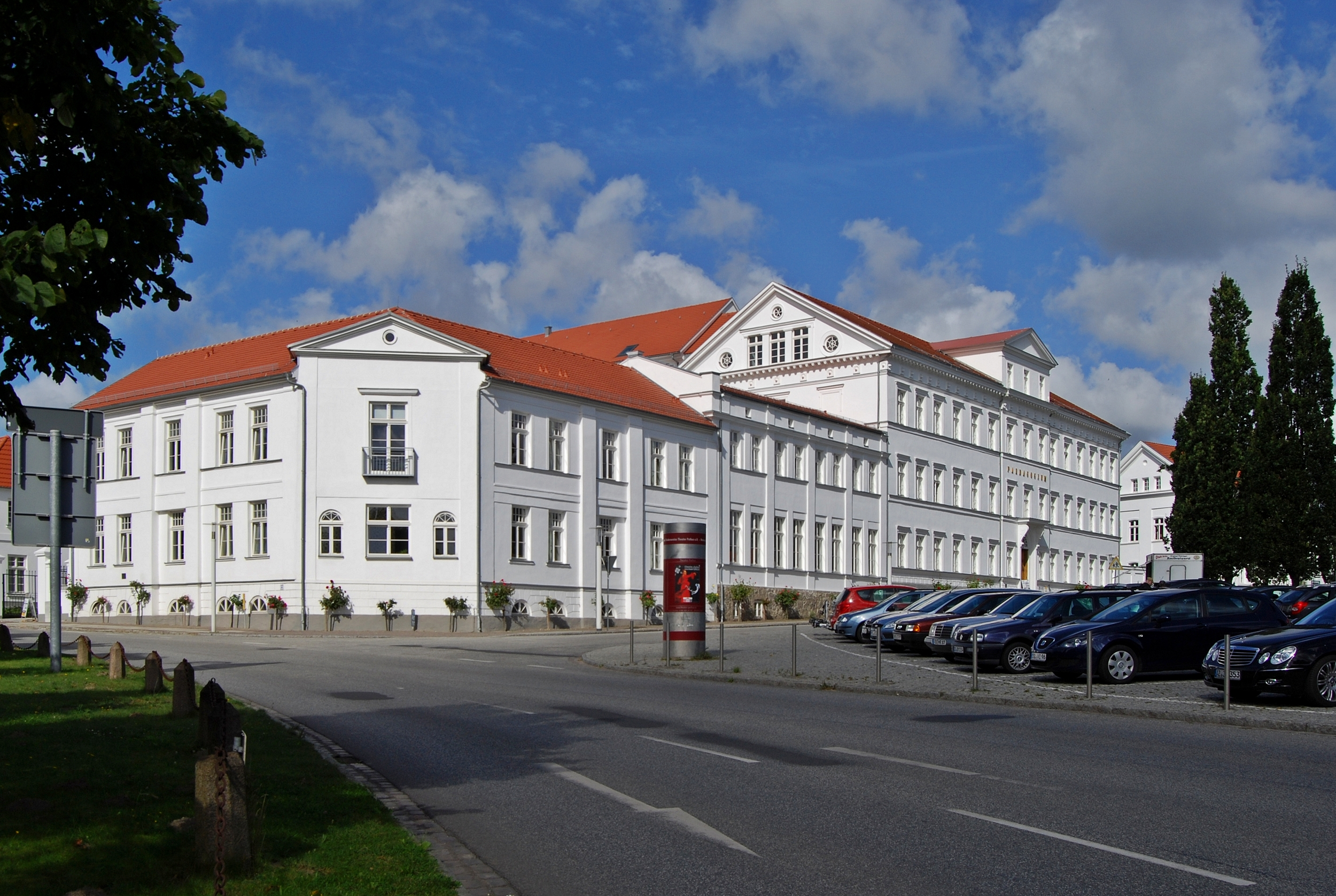 Das ehemalige Pädagogium Putbus am Circus in Putbus, island of Rügen, Mecklenburg-Vorpommern.